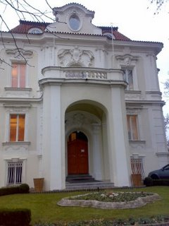 Praha-Vinohrady, Koperníkova 6, dříve budova ZŠ pro slabozraké a gymnázia pro zrakově postižené, dnes sídlo společností Media Marketing Services, zastupující soukromé rozhlasové stanice.